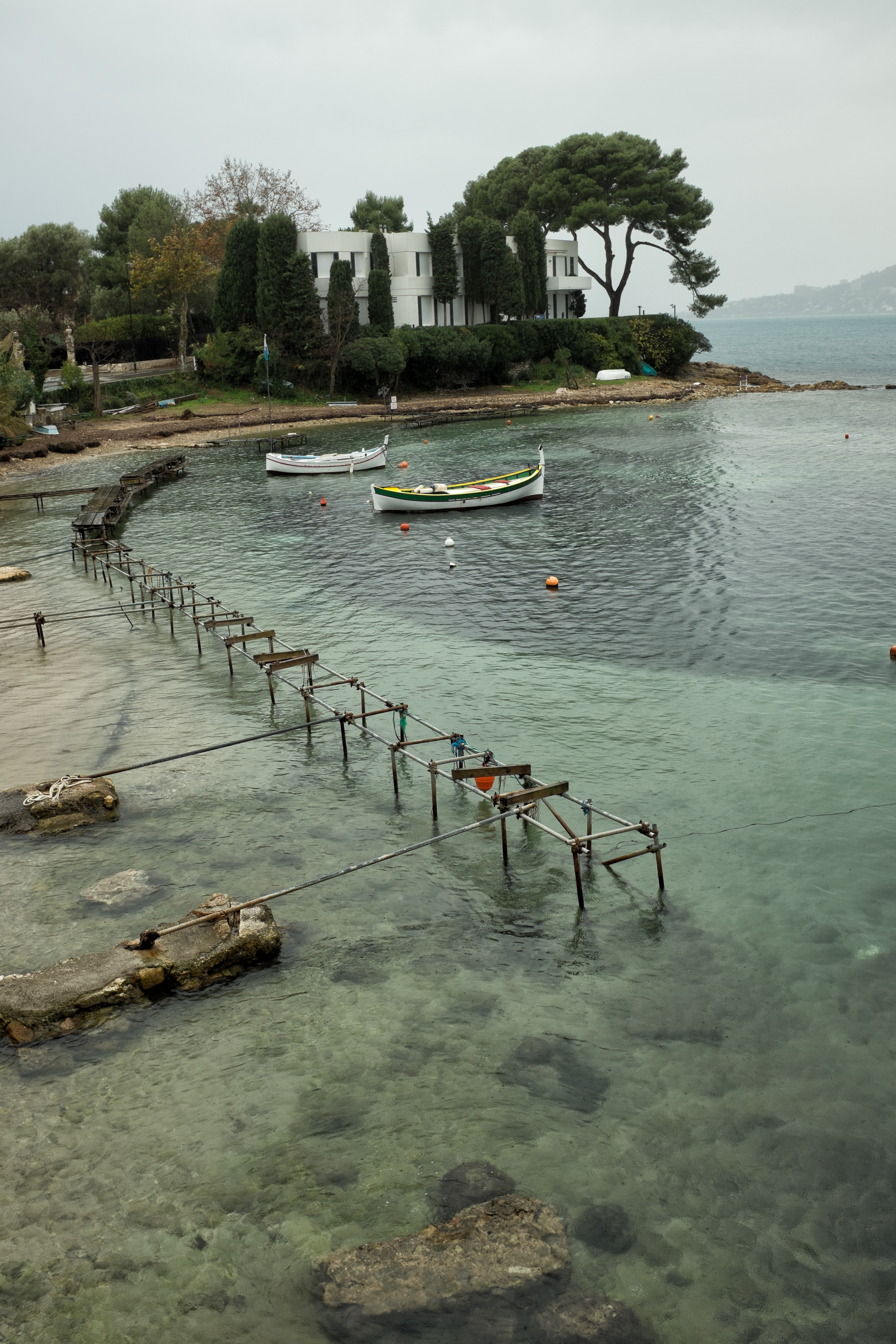 Port de l'Olivette à Juan-Les-Pins avec vue sur la Villa Aujourd'hui de Barry Dierks